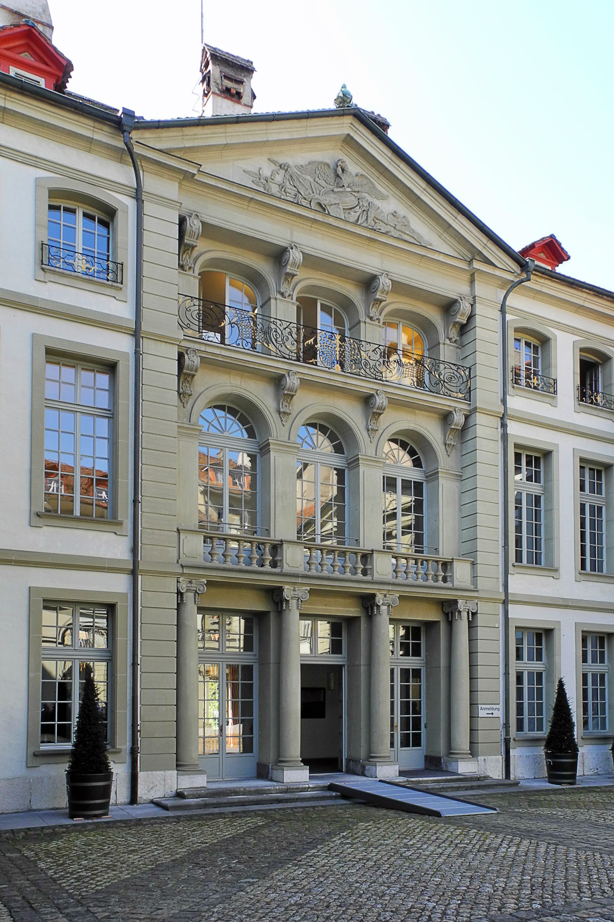 Erlacherhof, Junkerngasse 47 in Bern